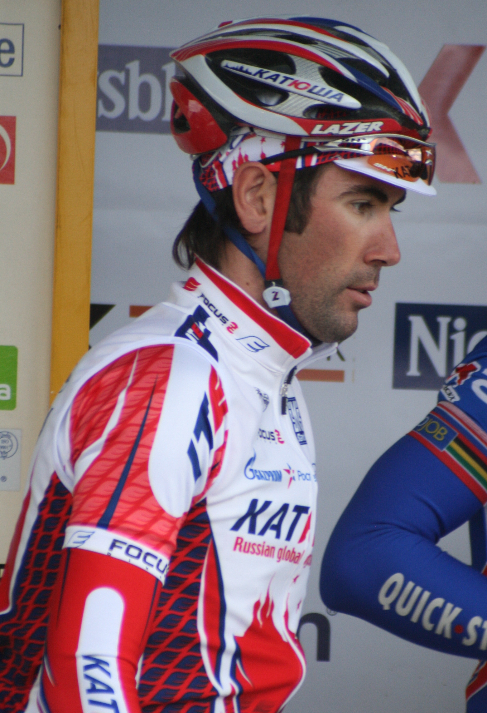 Kuurne-Bruxelles-Kuurne 2011, Vladimir Isaychev